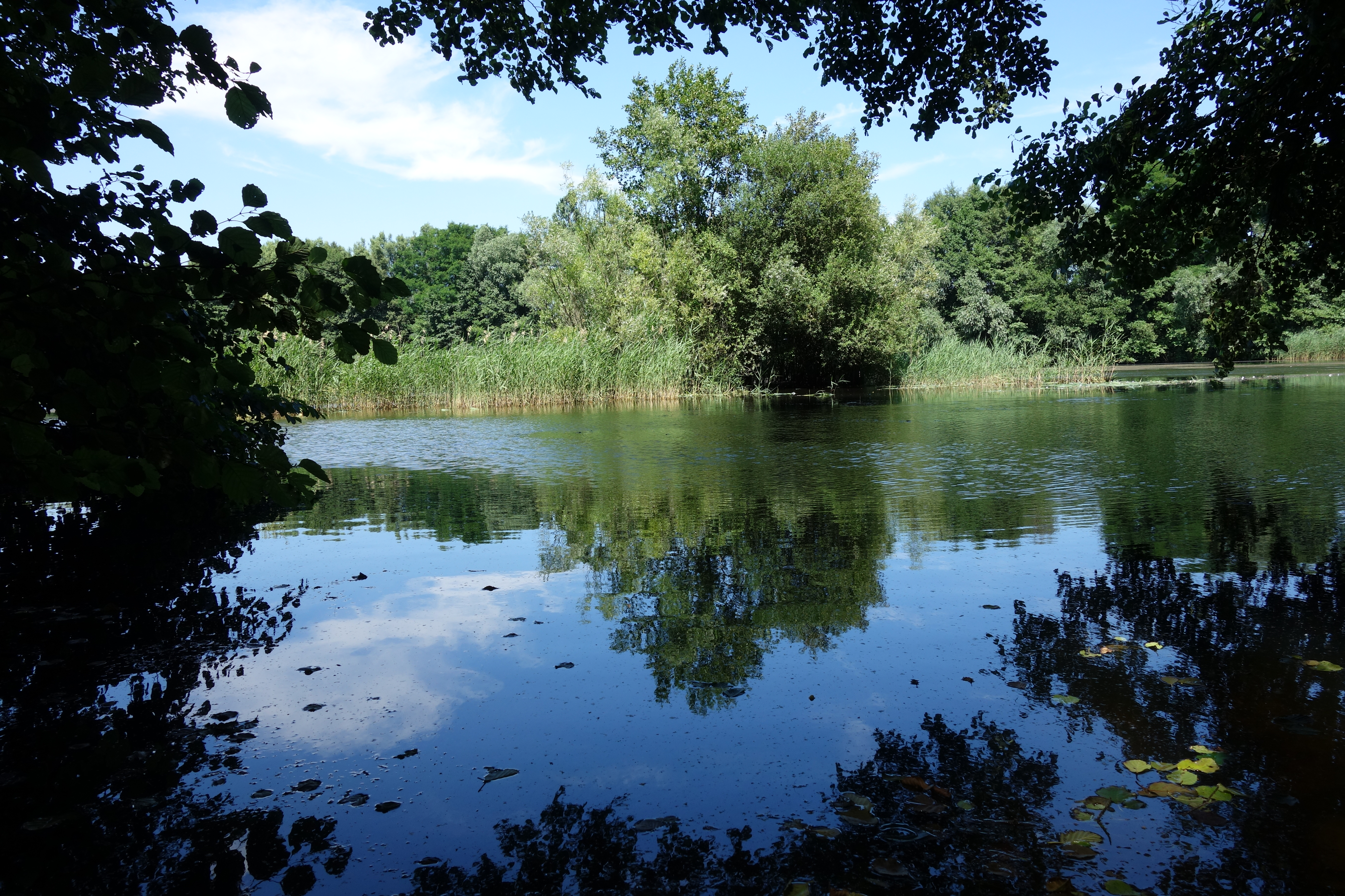 NSG Speckgraben bei Mainflingen